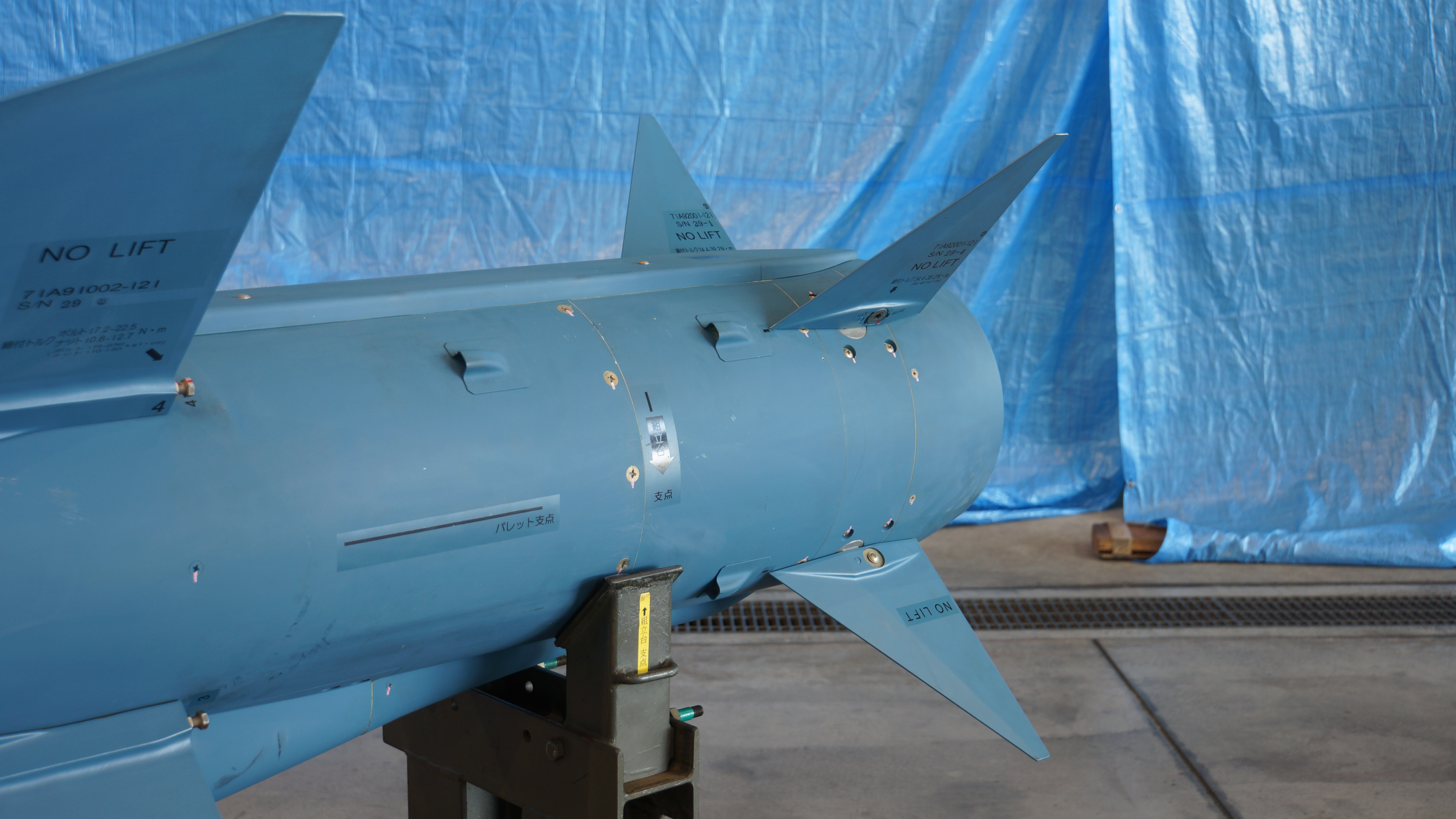 航空自衛隊 93式空対艦誘導弾（ASM-2） ダミー飛しょう体 操舵翼。2016年10月30日 岐阜基地にて。